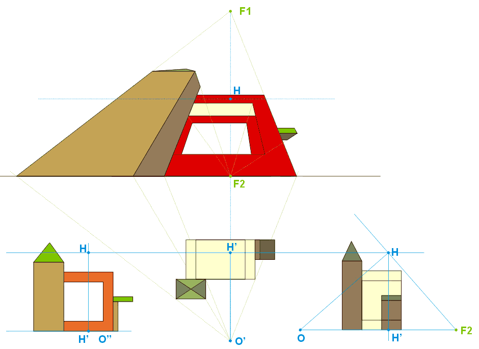 Fluchtpunktkonstruktion aus Grund- und Aufriss in der Froschperspektive